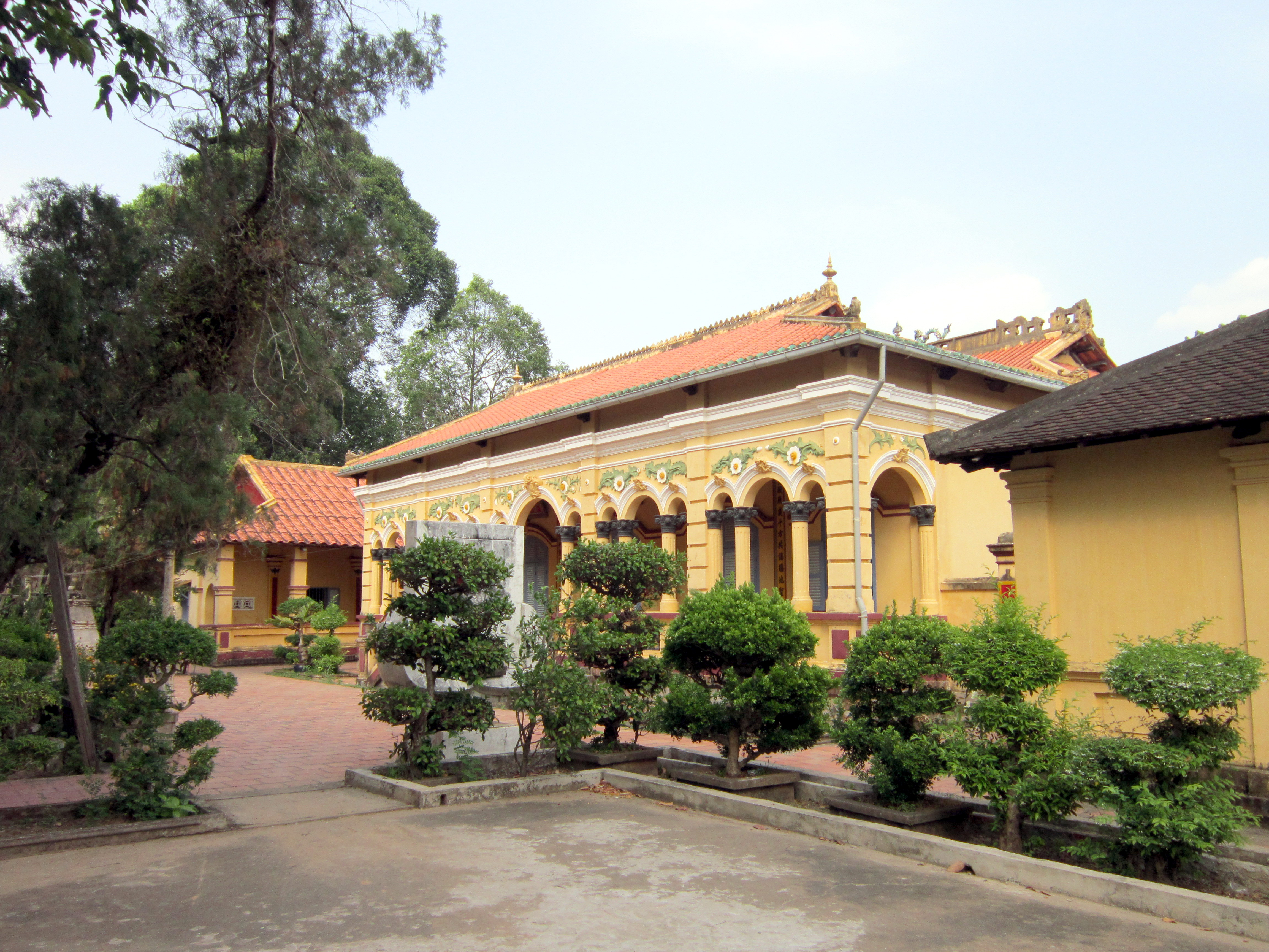 Toàn cảnh chùa Nam Nhã tọa lạc ở số 612, đường Cách Mạng Tháng Tám, phường An Thới, quận Bình Thủy, thành phố Cần Thơ, Việt Nam.